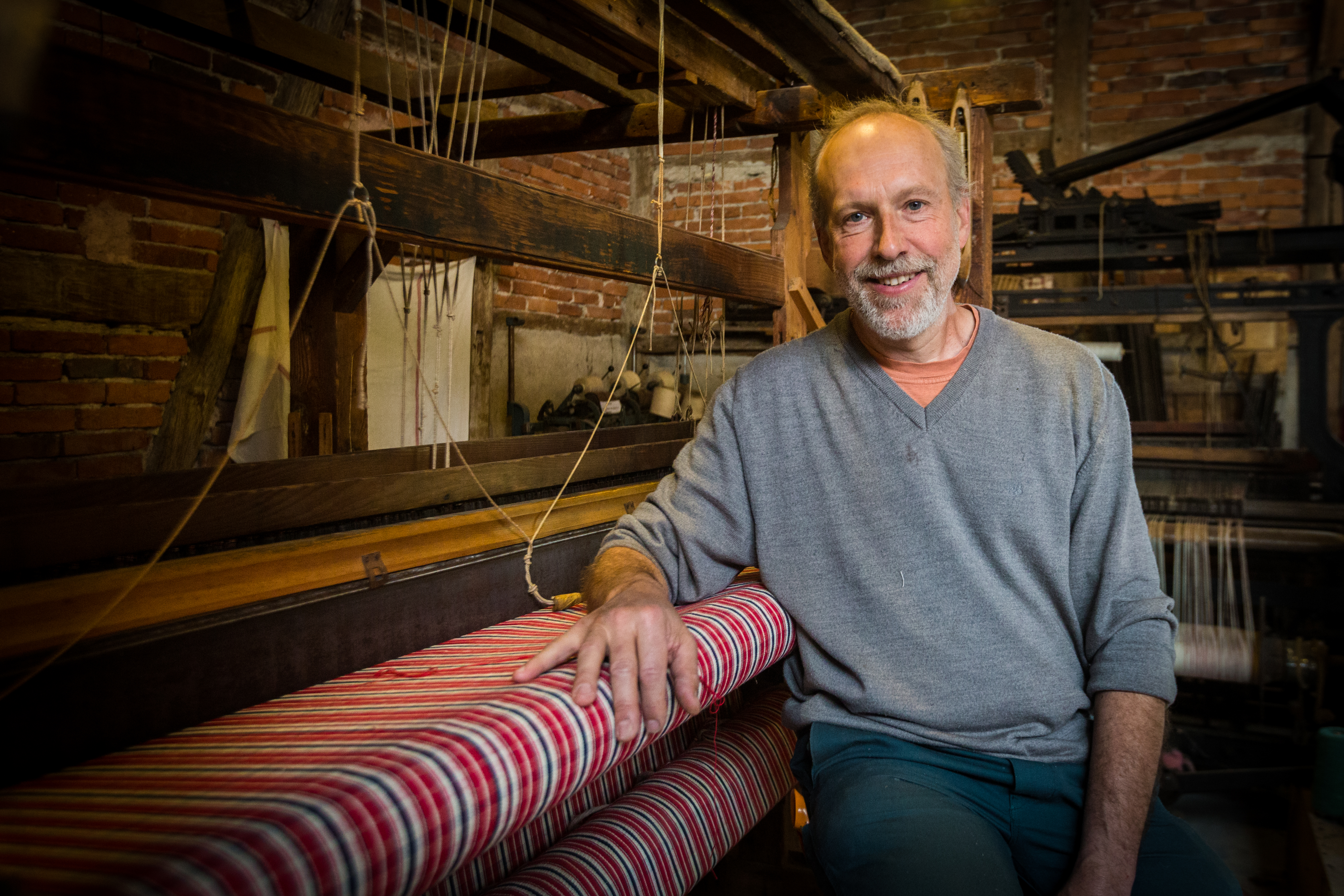 Michel Gander est un tisserand alsacien, spécialisé dans la fabrication du kelsch, dont l’atelier situé à Muttersholtz dans le Bas-Rhin est classé Entreprise du Patrimoine vivant.